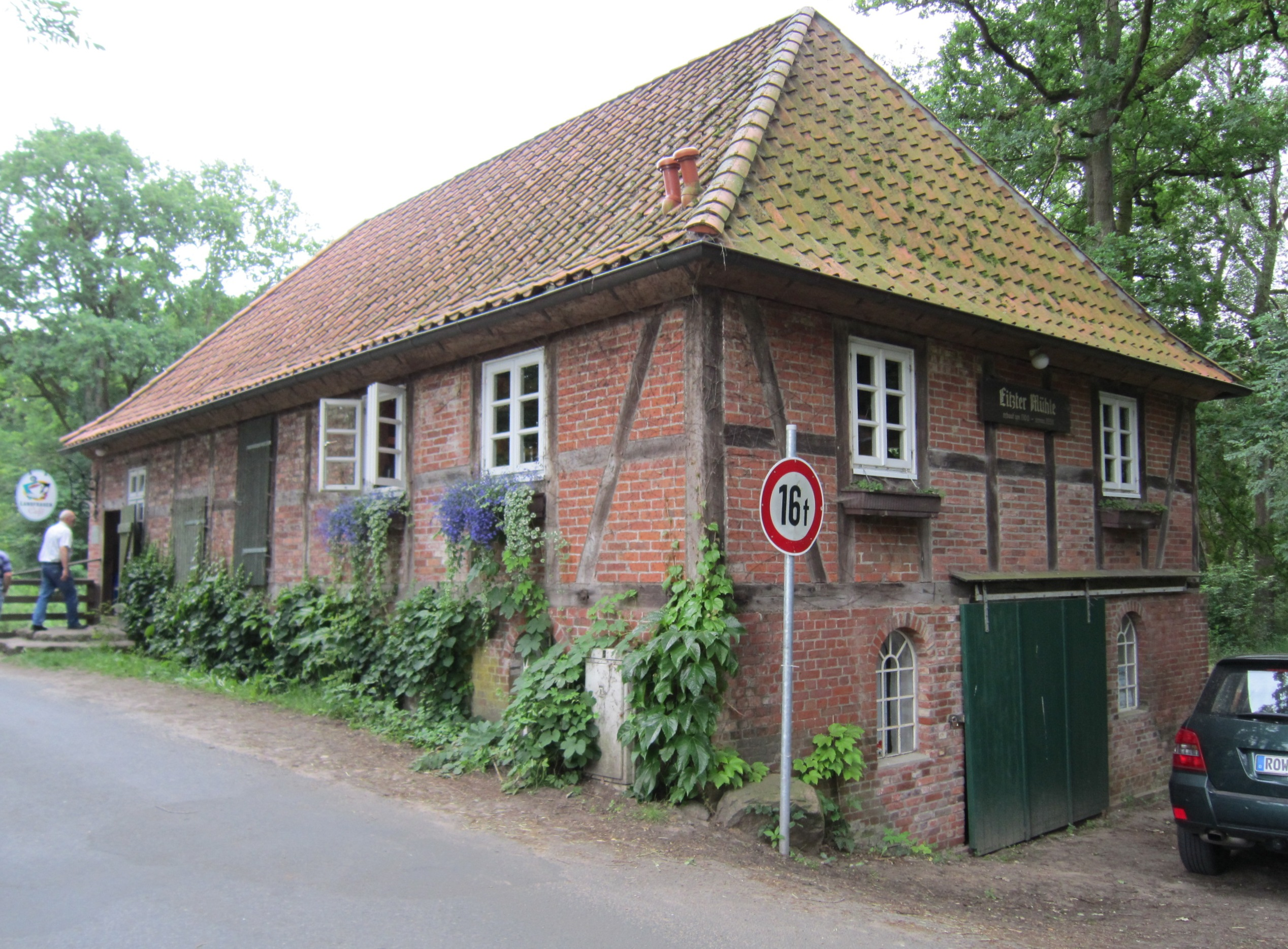 Eitzter Mühle an der Oste (Landkreis Rotenburg/Wümme, Niedersachsen)